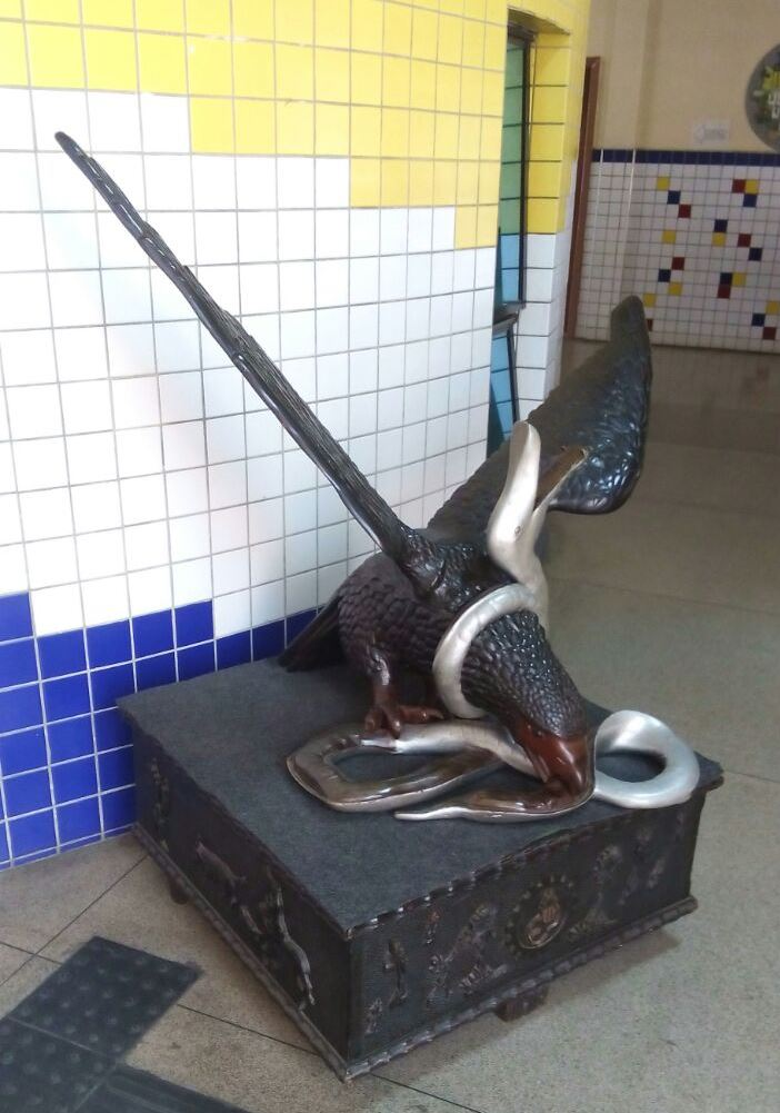 Foto que fiz da escultura do pássaro que tem perto da biblioteca do IFPI, em Teresina, no Piauí.